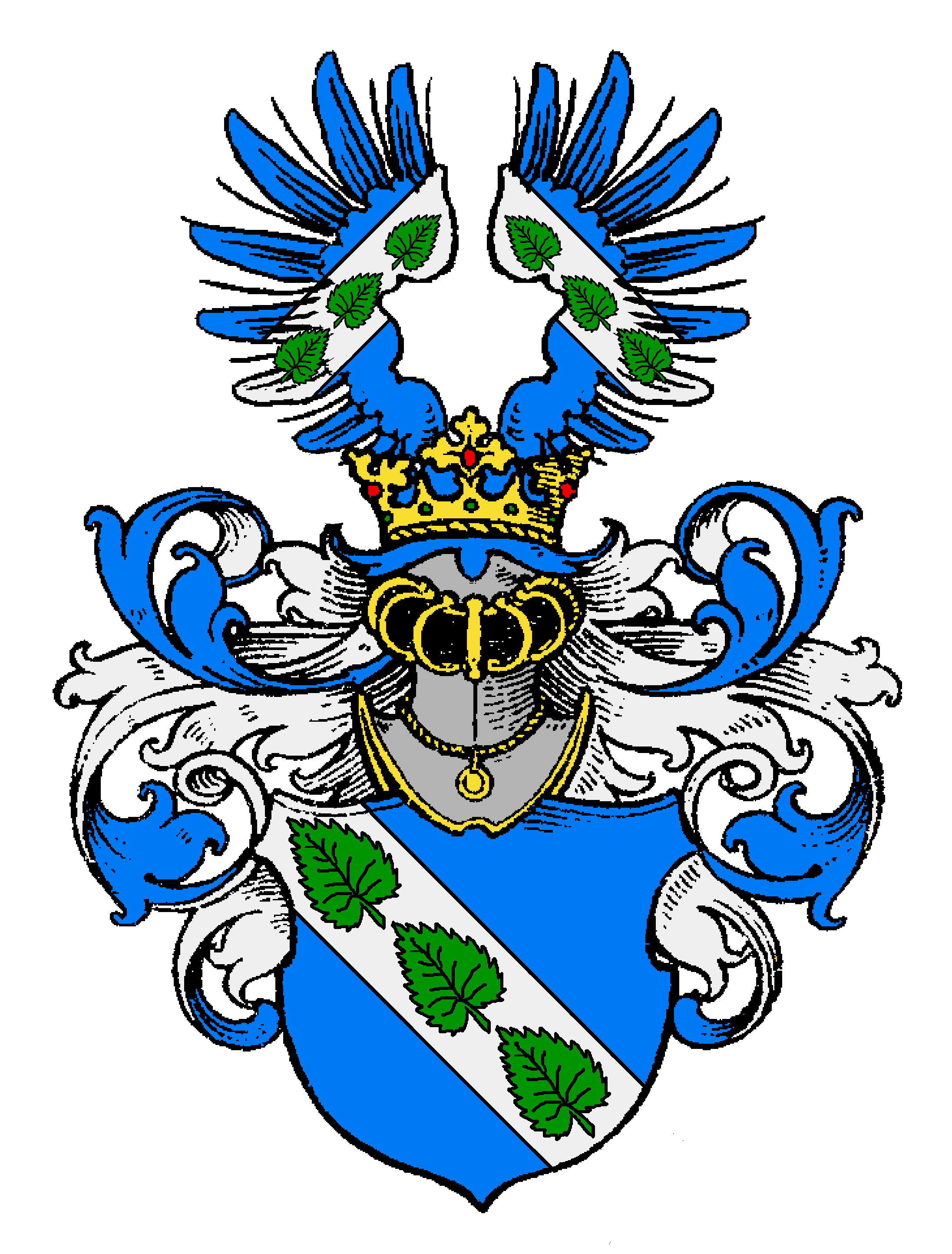 Adelswappen der Nettelbladt (vulgo Nettelbla), erstmals 1401 urkundliche, ursprünglich in Rostock ansässige Kaufmannsfamilie, die seit dem 16. Jahrhundert Ratsmitglieder stellte, 1746 in den Reichsadelsstand erhoben wurde.